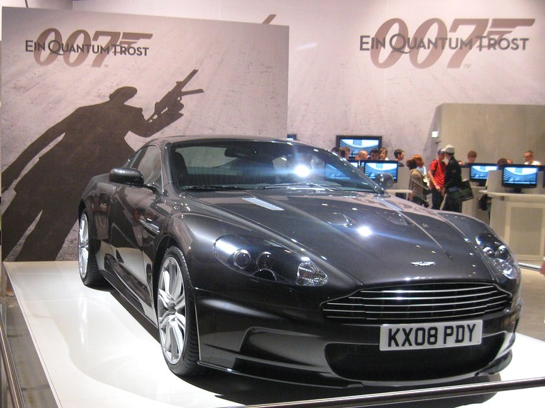 Aston Martin DBS James Bond. For Germans: Ein Quantum Trost!